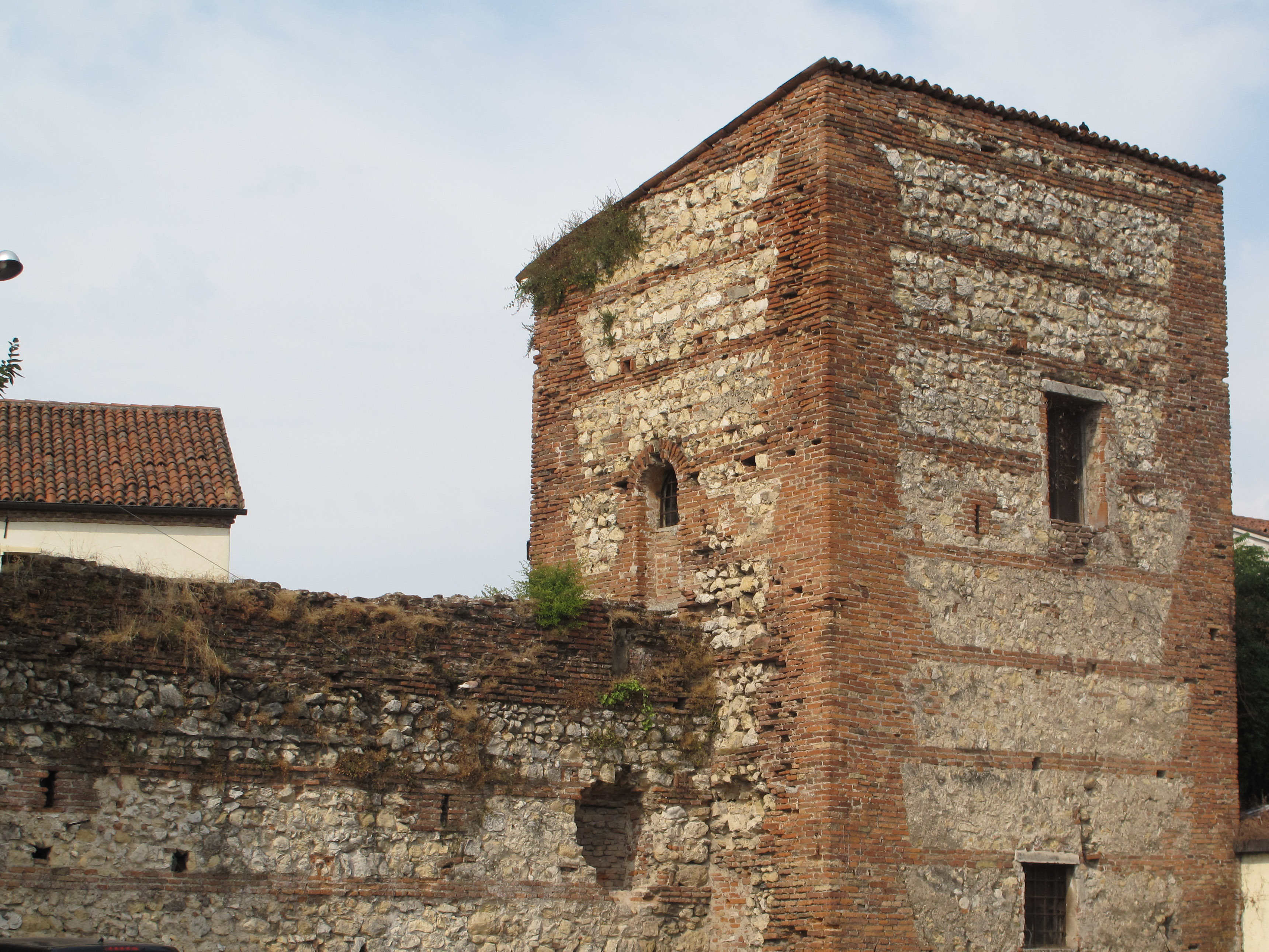 Vicenza - Mura scaligere orientali in via Legione Gallieno